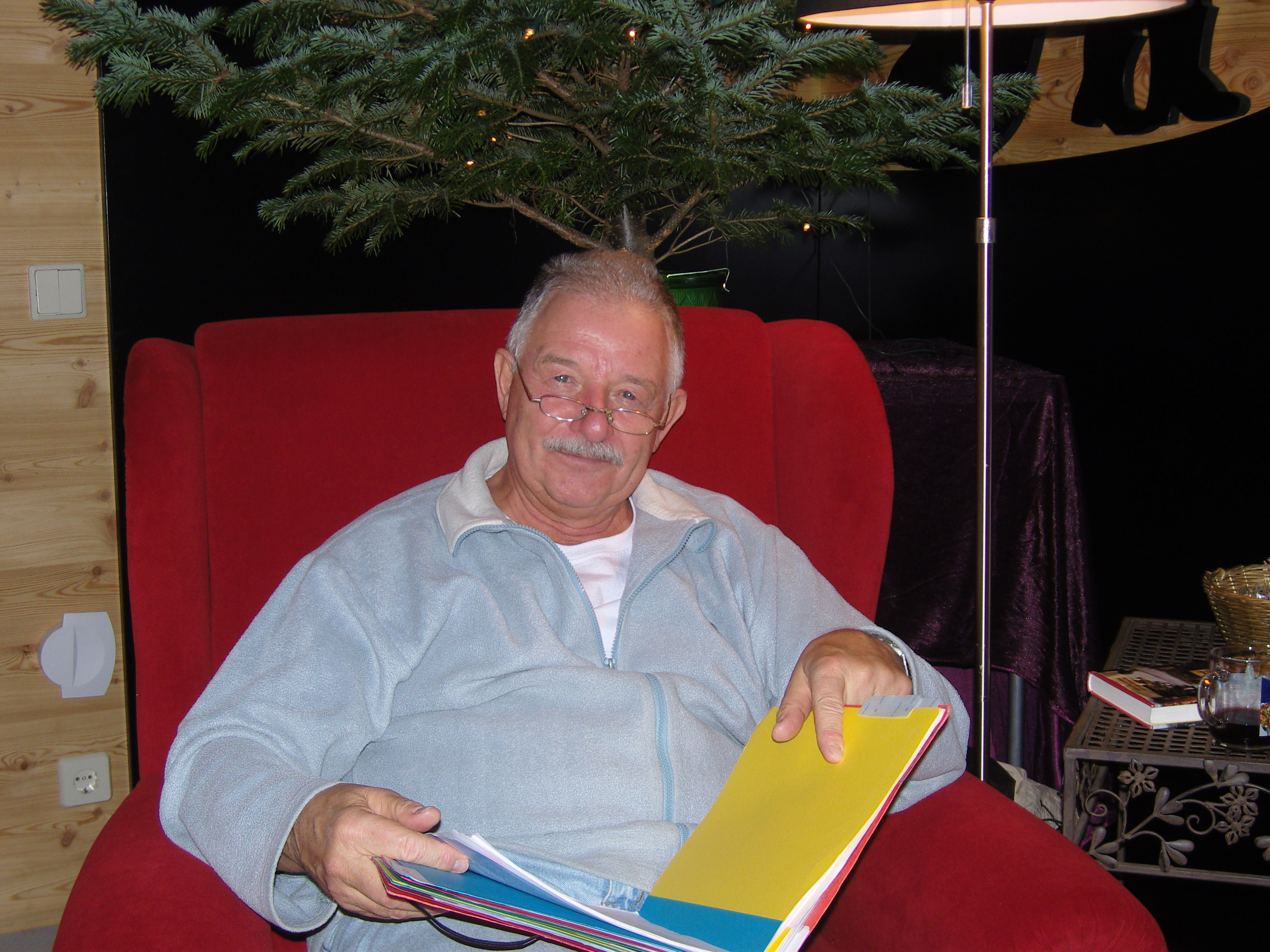 Buchautor und Politiker Christian F. Schultze liest auf dem Dresdner Striezelmarkt 2011 Weihnachtsgeschichten vor.